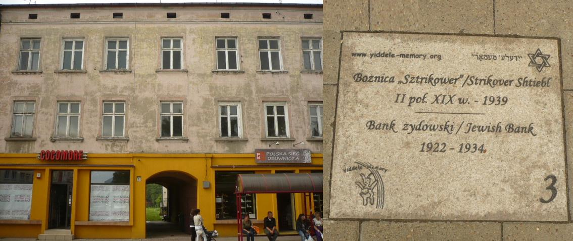 Radomsko. Otwarte Muzeum Żydowskie 3